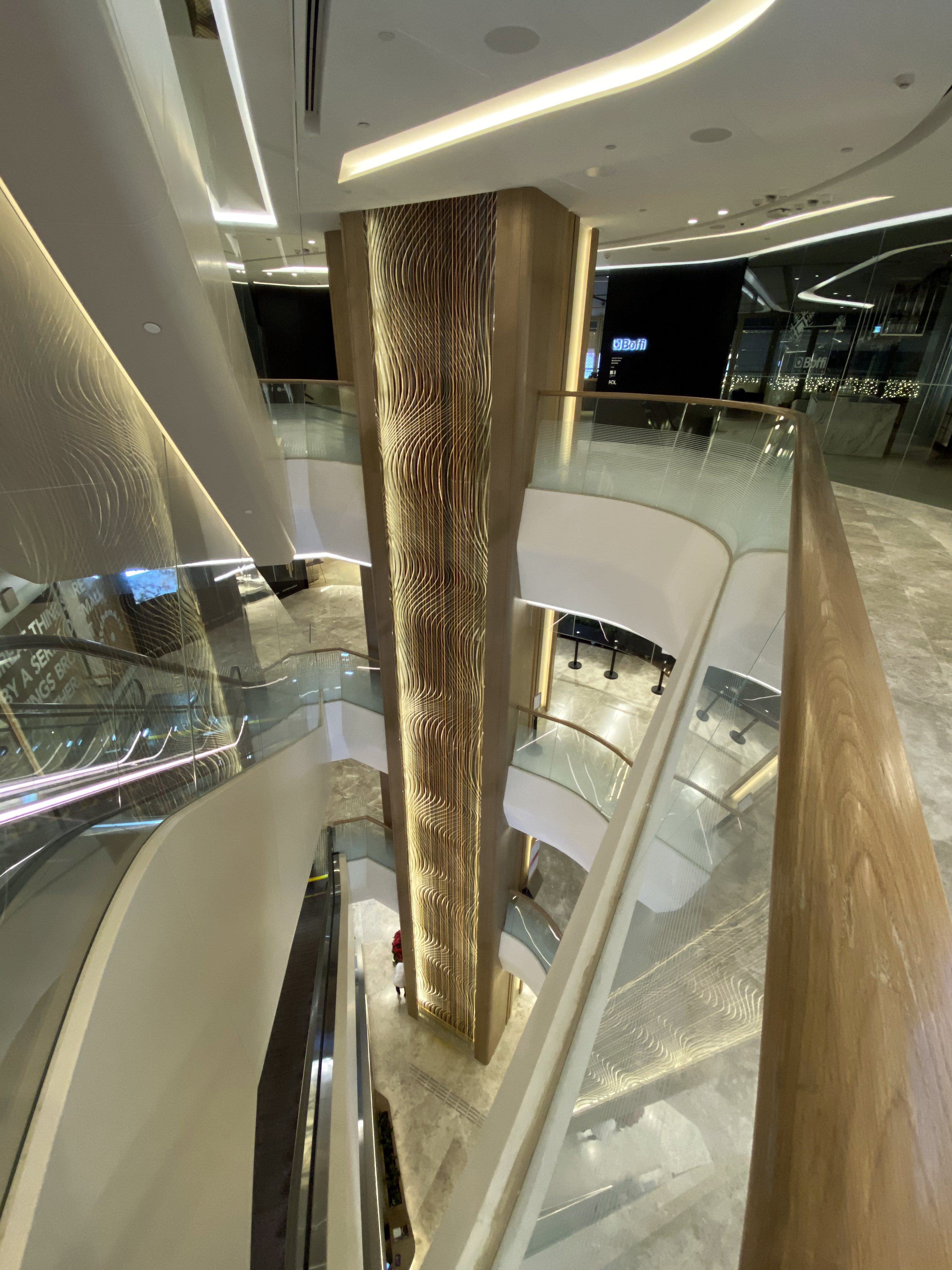 Lee Garden Three Void